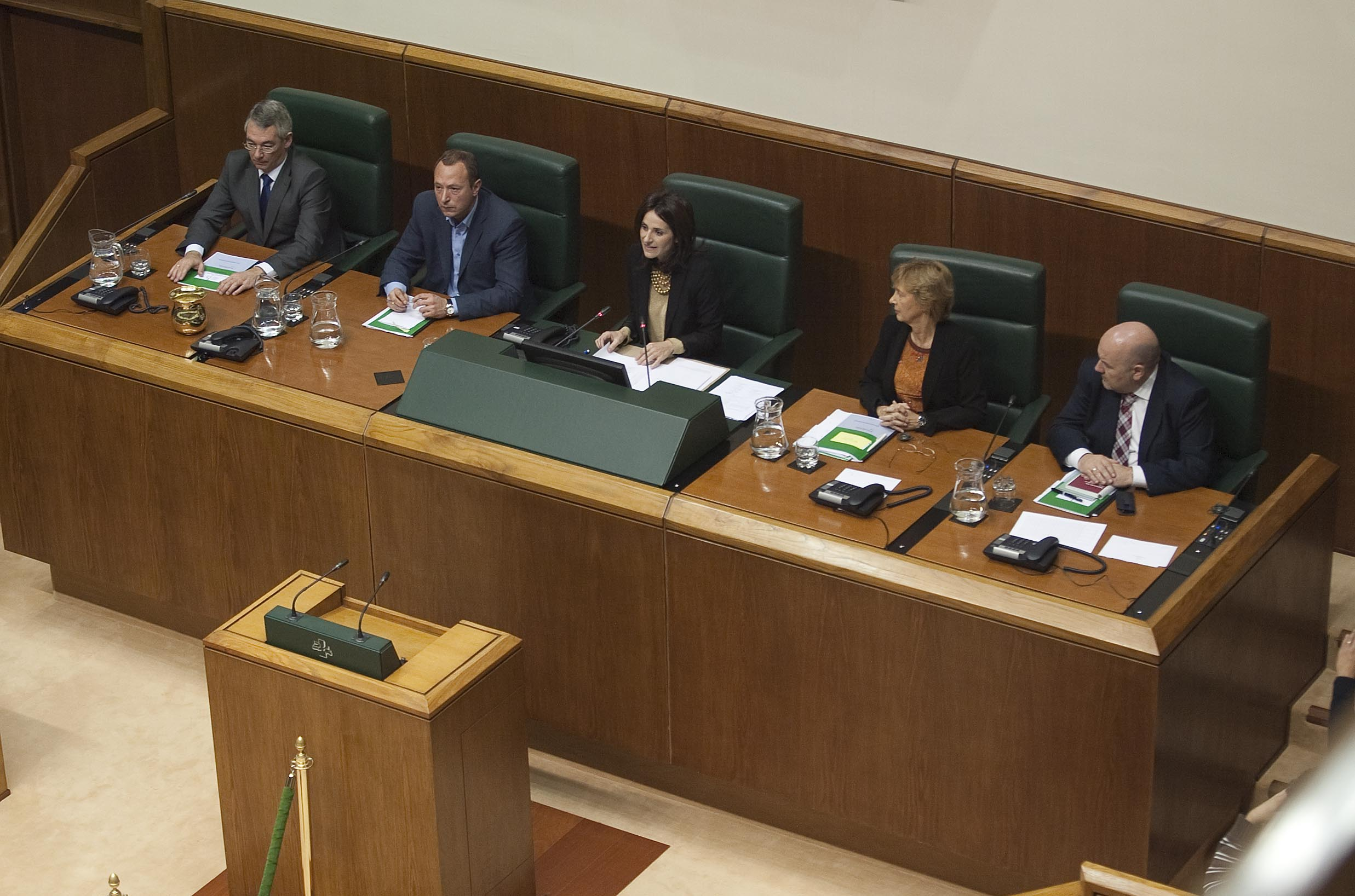 Antón Damborenea, Juanjo Agirrezabala, Bakartxo Tejeria, Blanca Roncal, Iñigo Iturrate